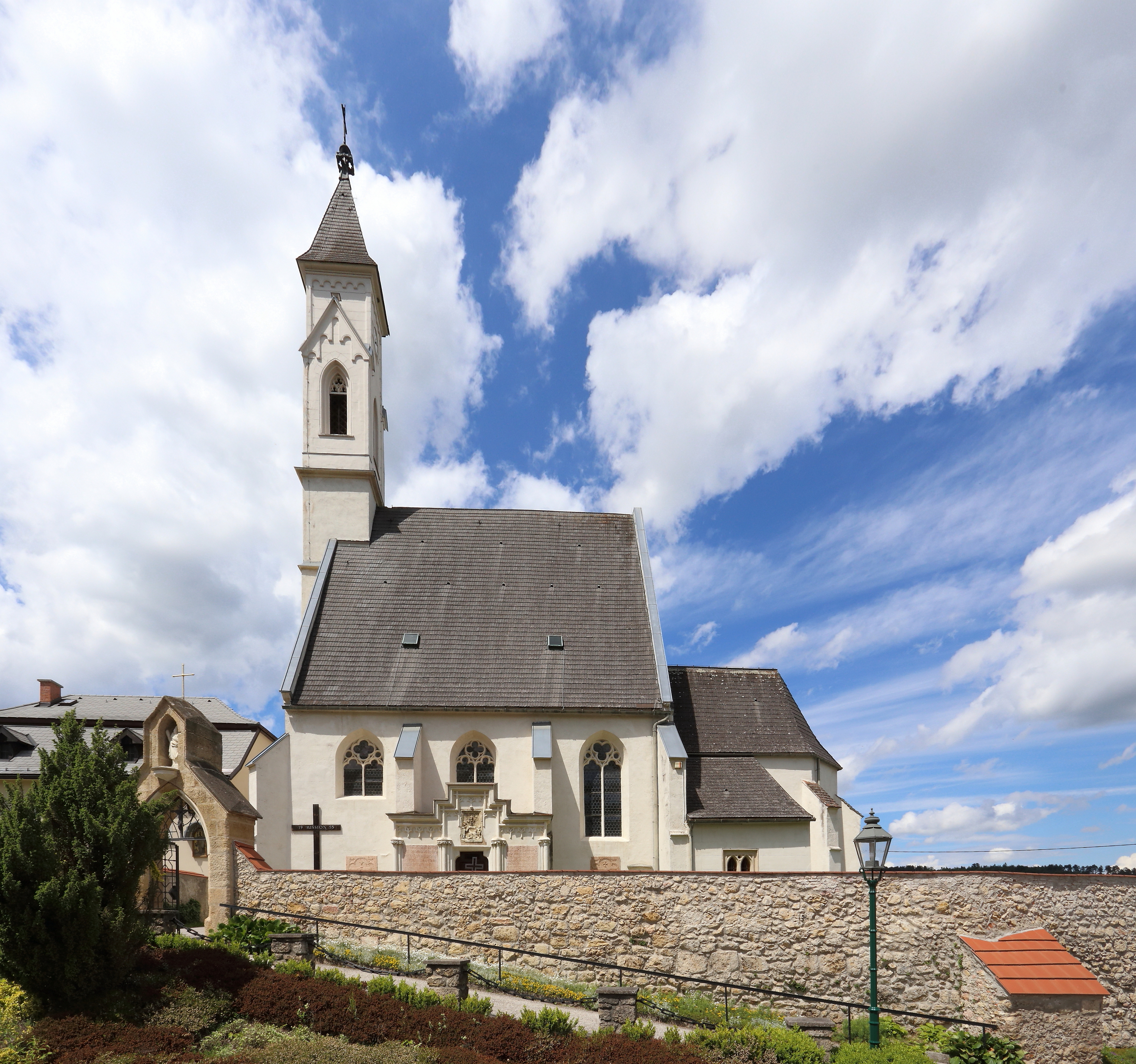 Die röm.-kath. Pfarrkirche hl. Andreas in der niederösterreichischen Gemeinde Seebenstein.Sie befindet sich auf einem Hügel in der Ortsmitte und ist von Resten einer mittelalterlichen Bruchsteinmauer umgeben. Das Langhaus, ein spätgotischer Zweistützenraum, wurde im ersten Drittel des 16. Jahrhunderts und der gotische Chor vor 1450 errichtet. Die teilweise regotisierte Einrichtung wurde nach Entwürfen von Josef Angeler aus Edlitz angefertigt. Die zahlreichen Rotmarmorgrabplatten aus der Zeit 1448 bis 1820 an der und in der Kirche sind Grabdenkmäler der Familien der Königberger und Pergen.